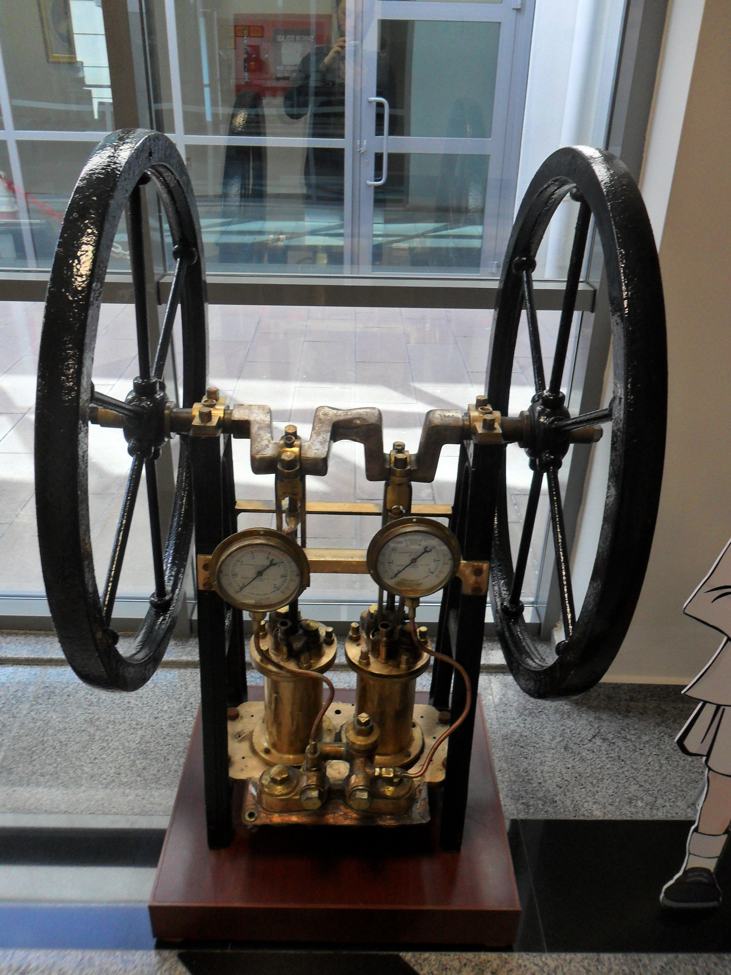 Mersin Deniz Müzesinde sergilenmekte olan dalgıç hava makinasının iç aksamı. Siebe Gorman and Co. Engineers Limited şirketi tarafından Londra'da üretilmiştir. Her iki yanında çevirme kollarına takılı tekerlekler bulunmaktadır. Burada görülmeyen dış kaplaması ceviz ağacından yapılmadır.